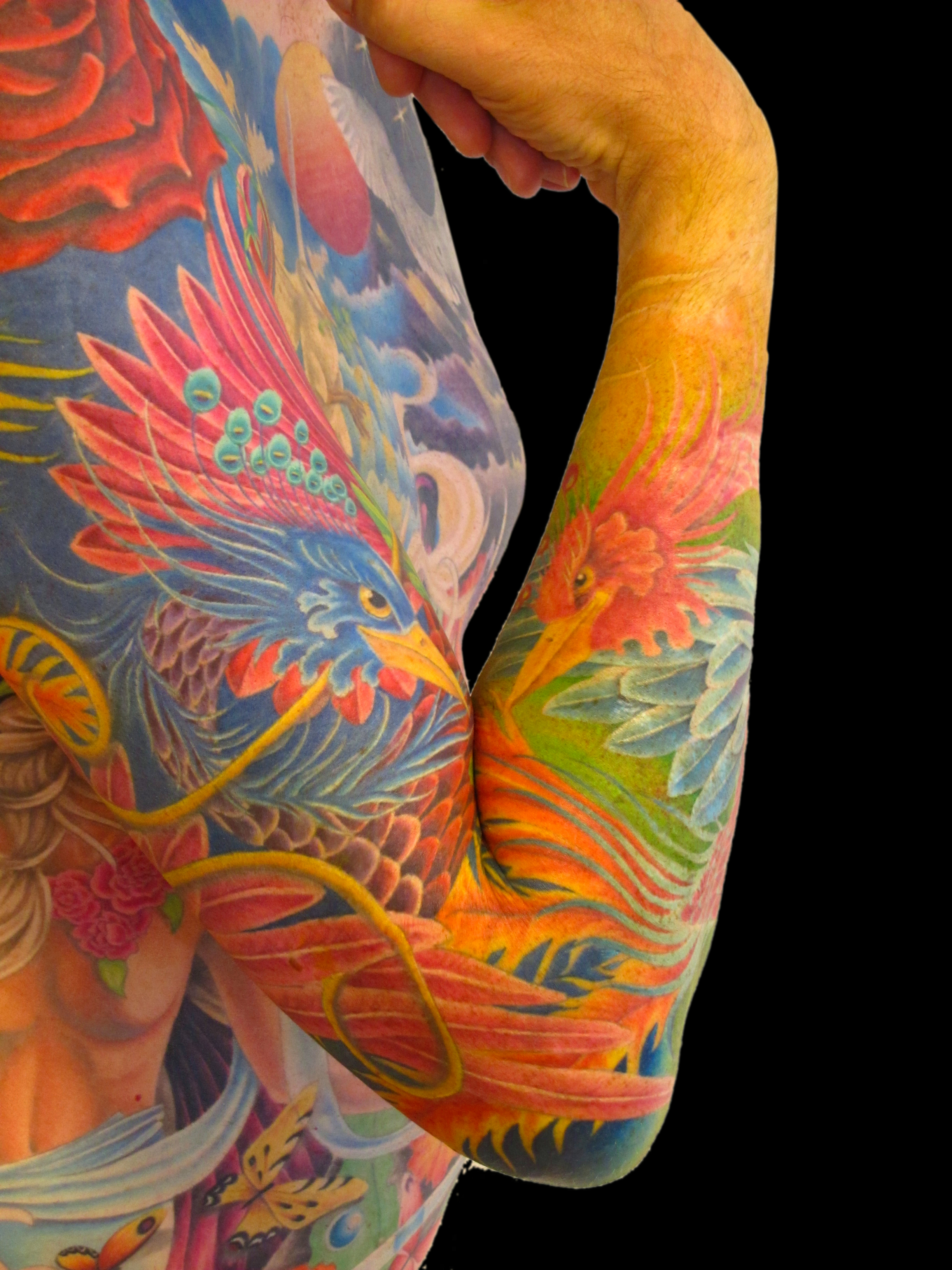 Dos fénix coloridos en un tatuaje de manga completa como parte de un traje de cuerpo completo, tatuado por Maaike de Jong, Growink Tattoo Studio, Heerenveen, Países Bajos. Observe cómo los picos de ambos pájaros se "besan" cuando el brazo se dobla.